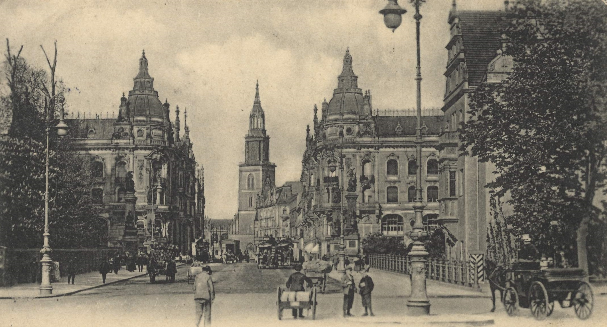 Blick über die Kaiser-Wilhelm-Brücke in Berlin Richtung Burgstraße und Marienkirche.